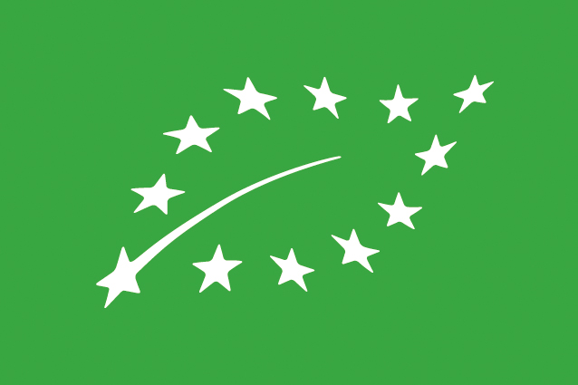 logo européen Agriculture biologique